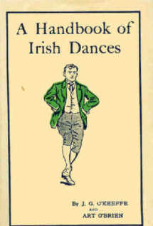 Deckseite des Buches "A Handbook of Irish Dances" 5.Auflage, 1934